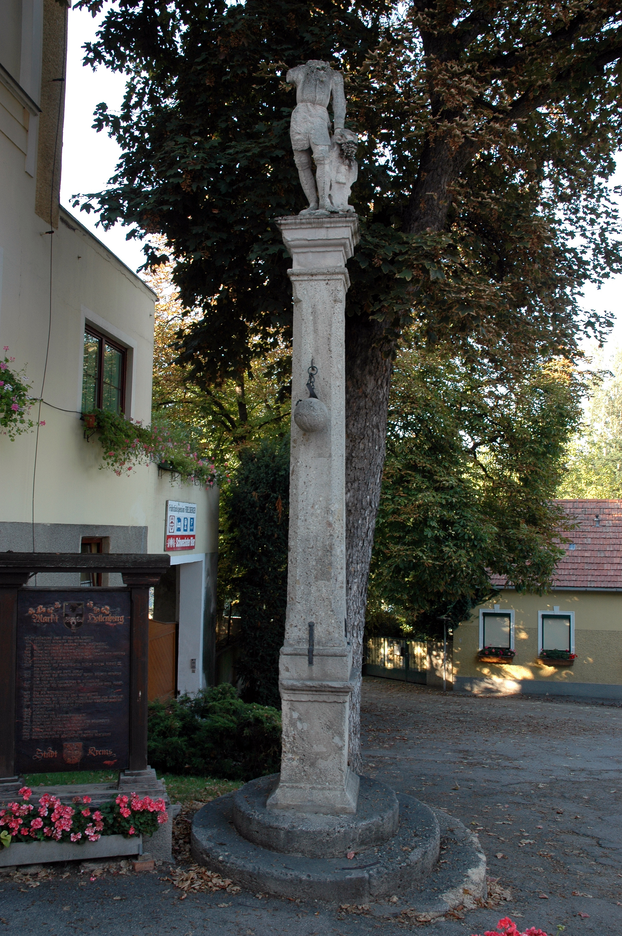 Pranger Hollenburg